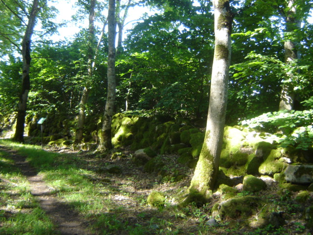 Linnuse ringmüür